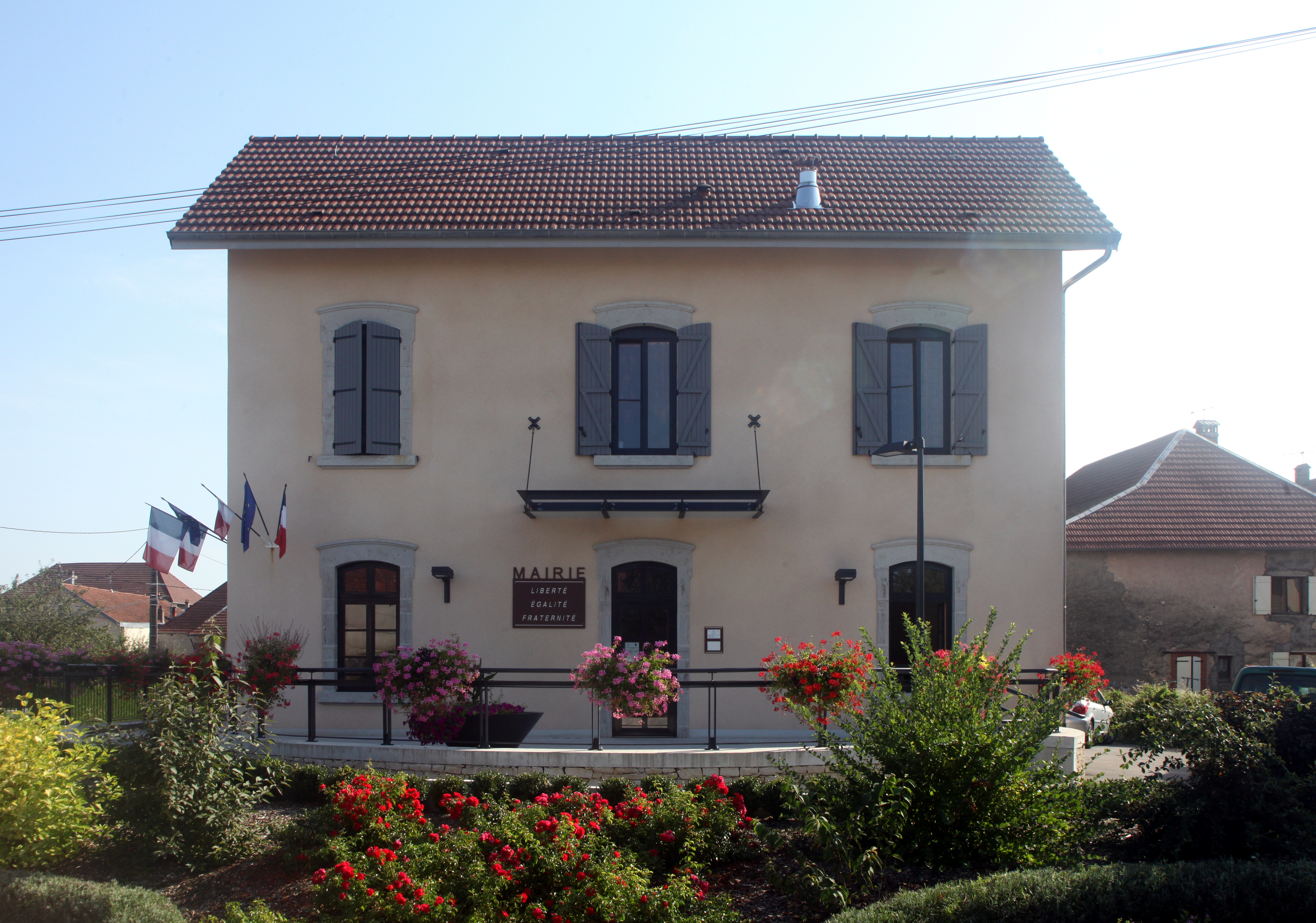 Mairie de Naisey-les-Granges (Doubs).